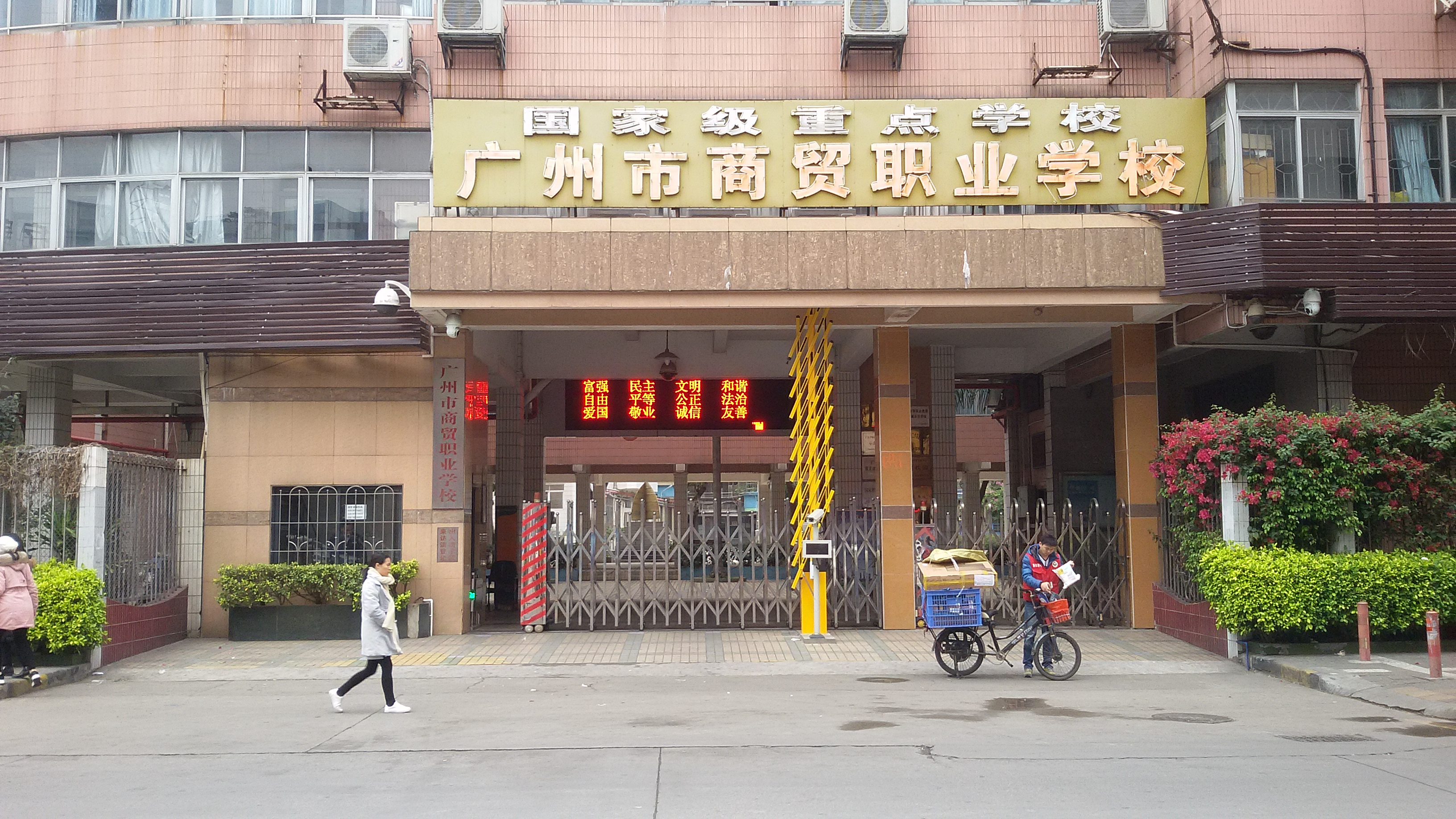 粵語: 廣州市商貿職業學校（北校區）